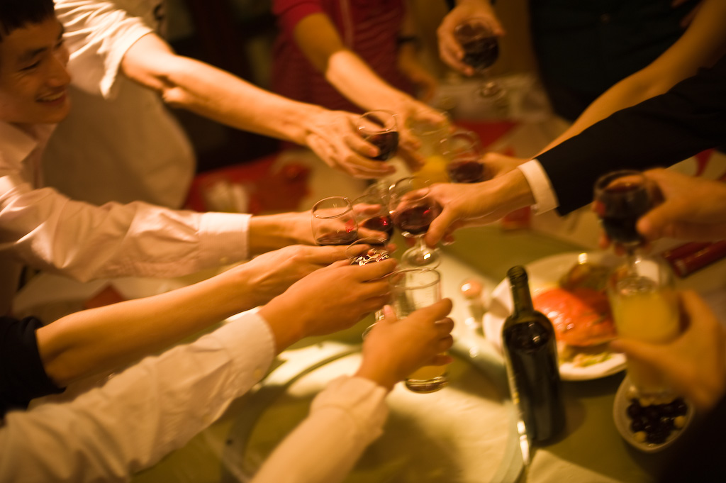 Cheers!